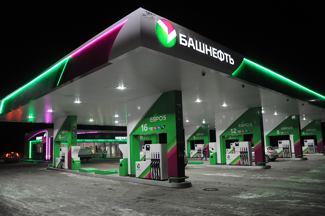 АЗС ПАО АНК "Башнефть" в Уфе